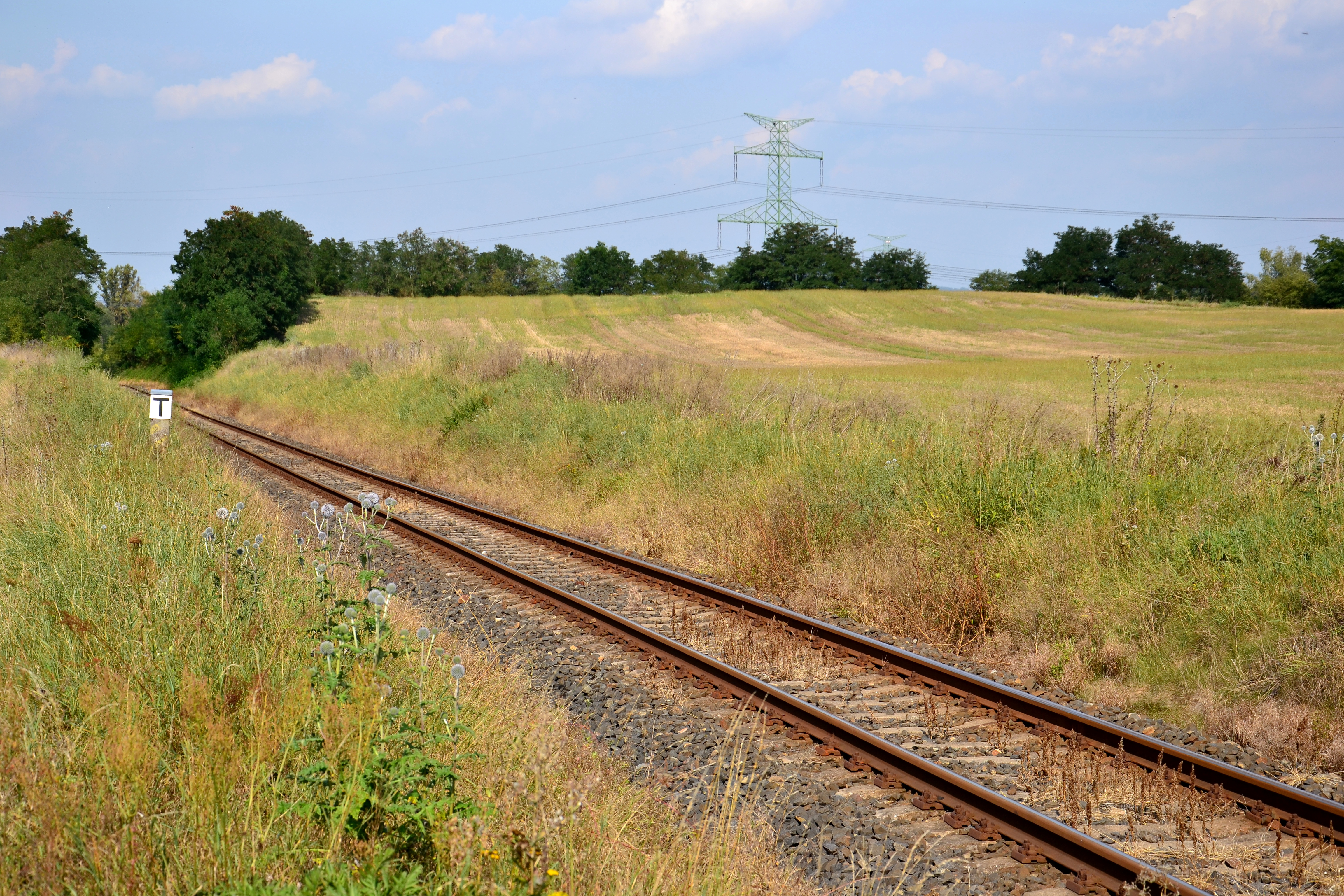 Hradiště Na Šachtách, Březno (Postoloprty).